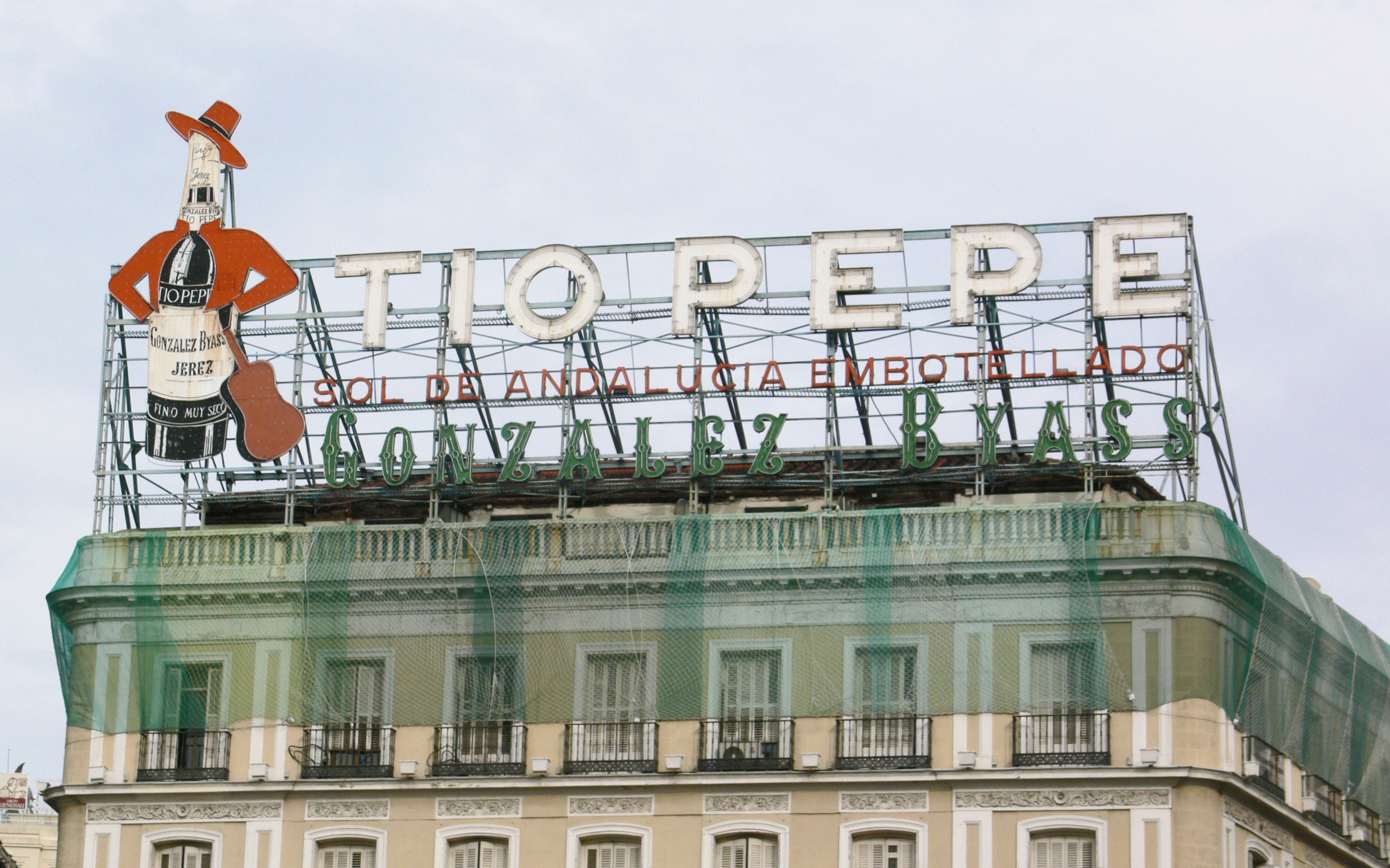 Tío Pepe sign, Madrid